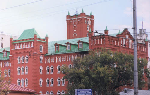 Саратов. Здание мельницы Шмидта на улице Чернышевского